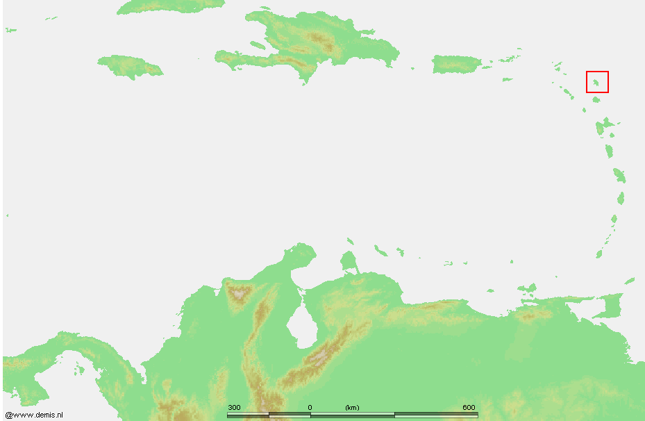 Caribbean - Barbuda.PNG